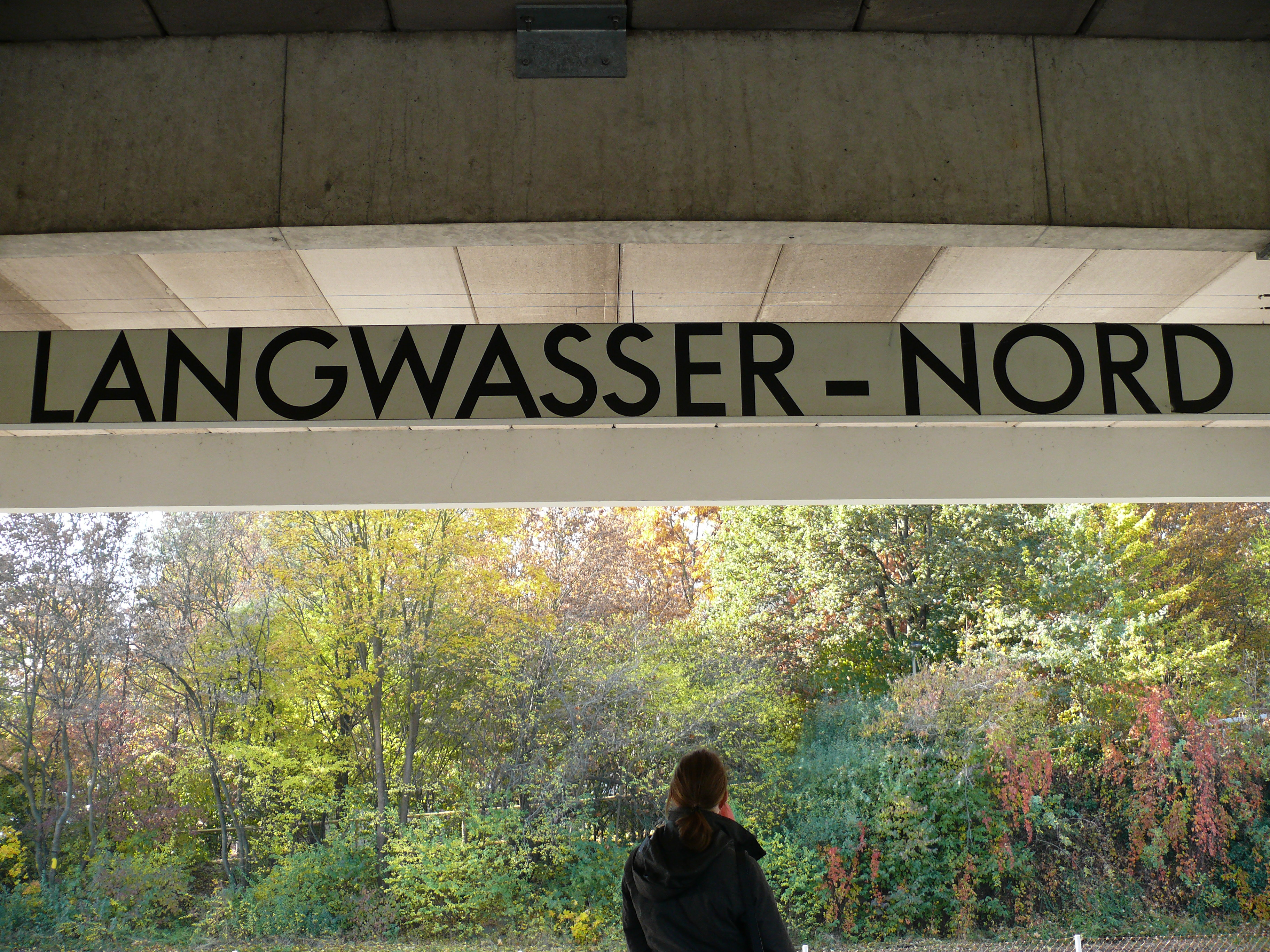 Stationsschild am oberirdischen U-Bahnhof Langwasser Nord in Nürnberg.